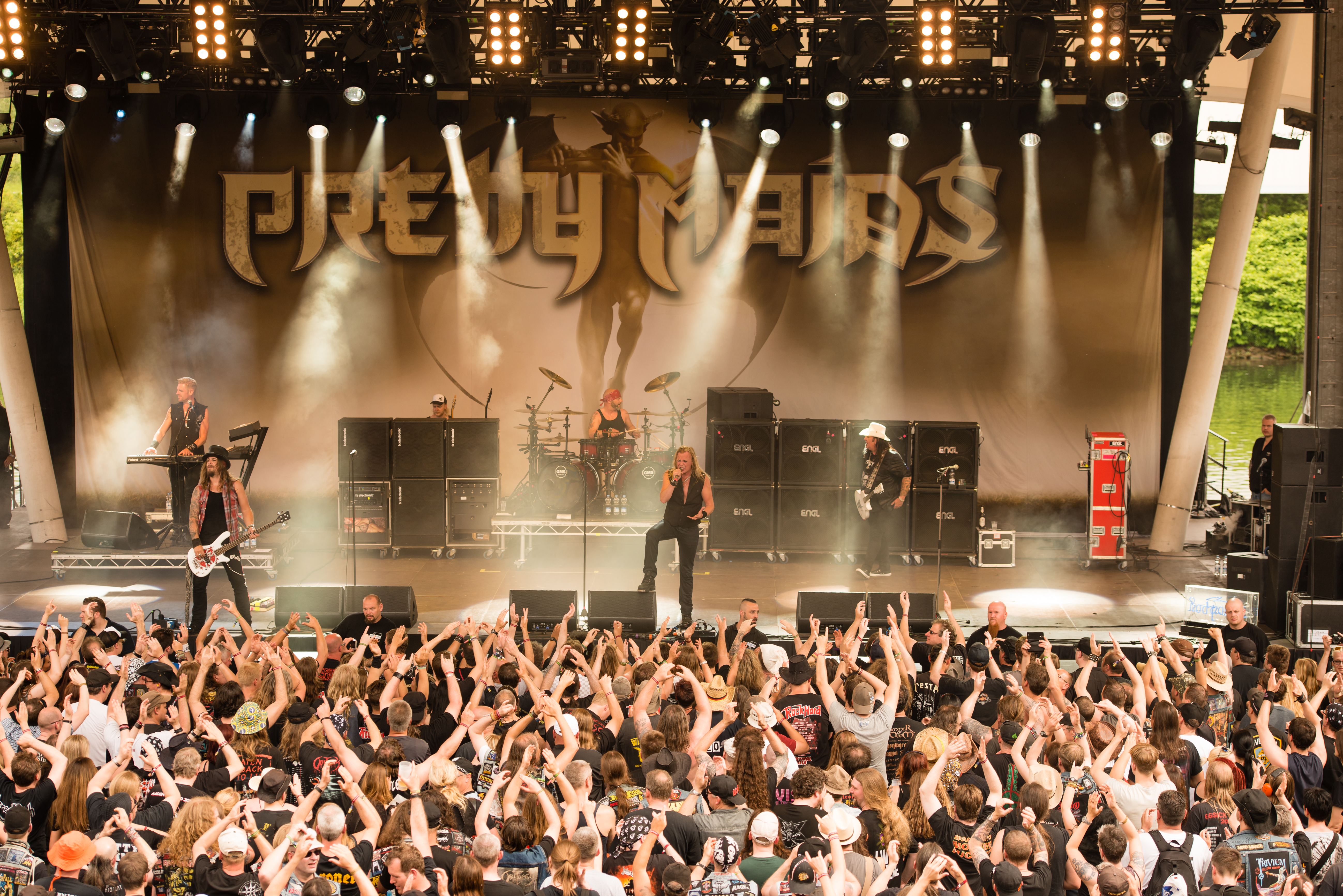 'Rock Hard Festival 2014 - Gelsenkirchen': 'Pretty Maids'